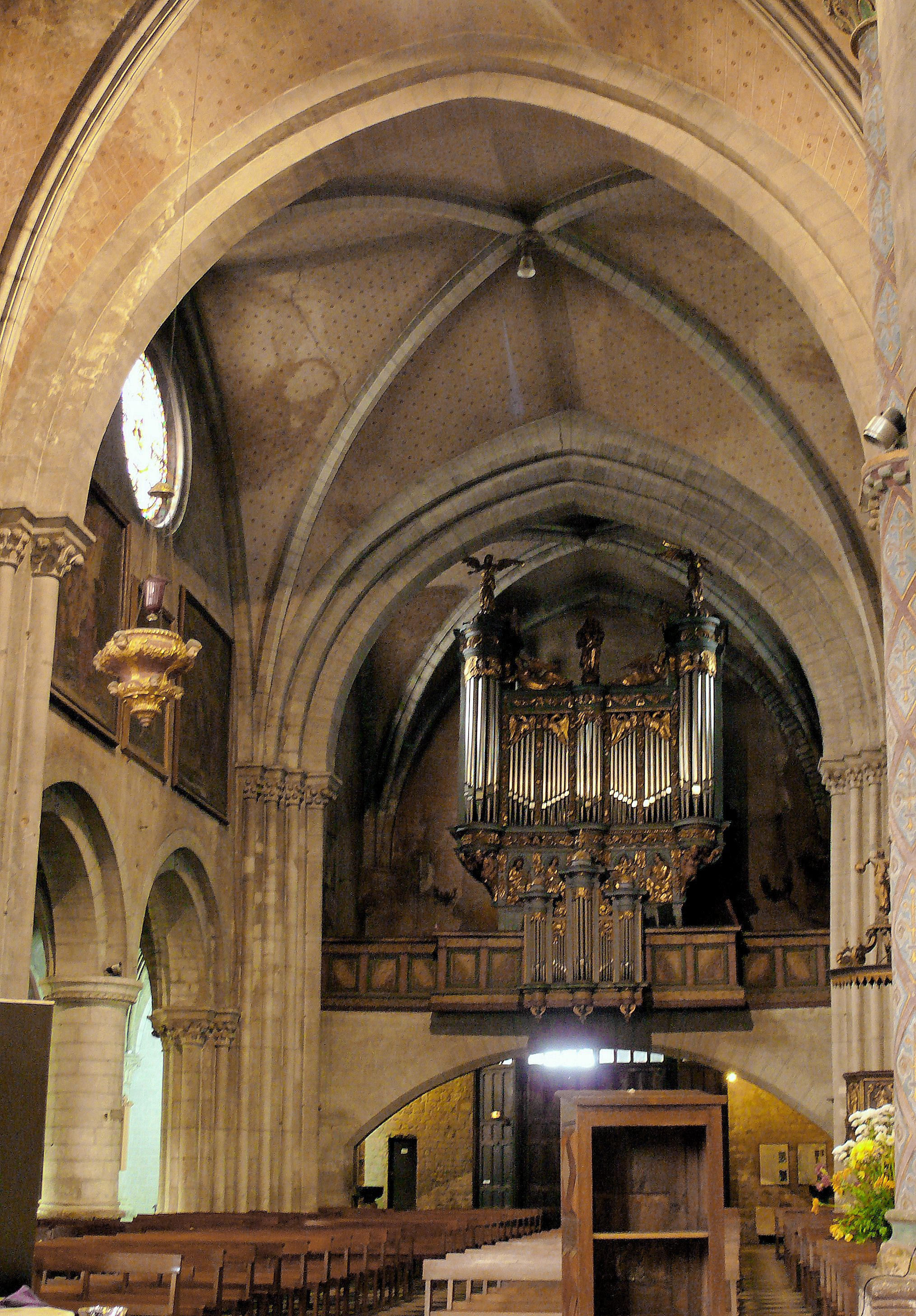 Oloron-Sainte-Marie - Cathédrale Sainte-Marie - Nef centrale : tribune et orgue au-dessus de l'entrée